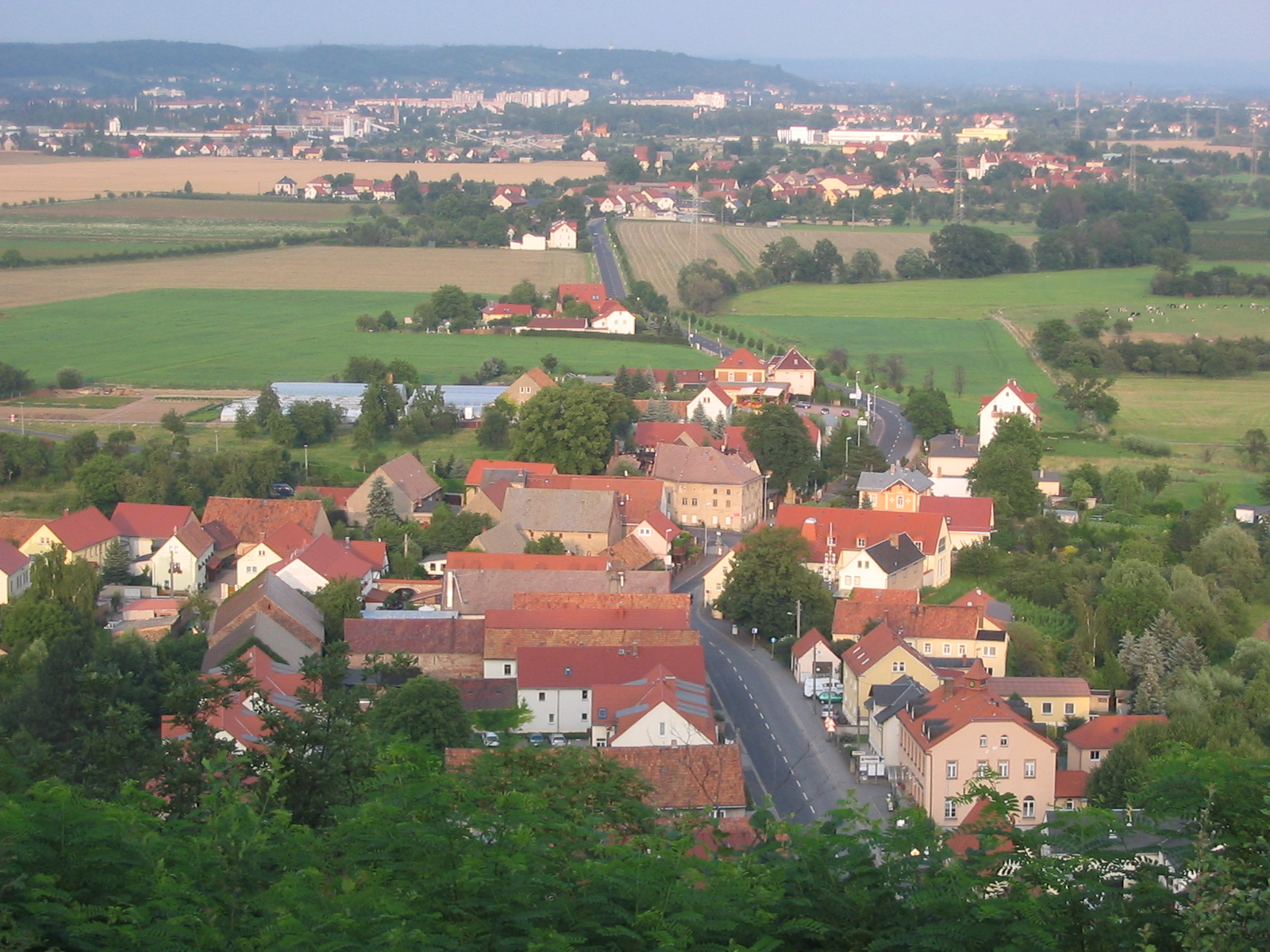 Blick von der deutschen Bosel auf Sörnewitz und Brockwitz - Denkmalschutzgebiet der Dörfer Brockwitz und Sörnewitz, im Hintergrund befindet sich die Stadt Coswig (Sachsen).